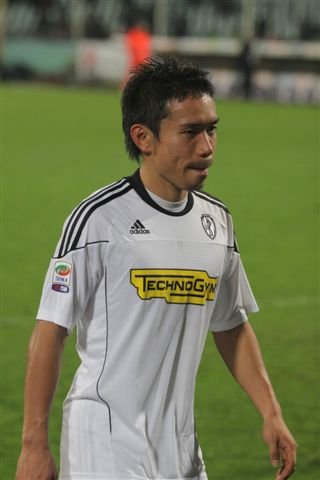 Yuto Nagatomo è un calciatore giapponese, difensore dell'inter e della Nazionale giapponese.